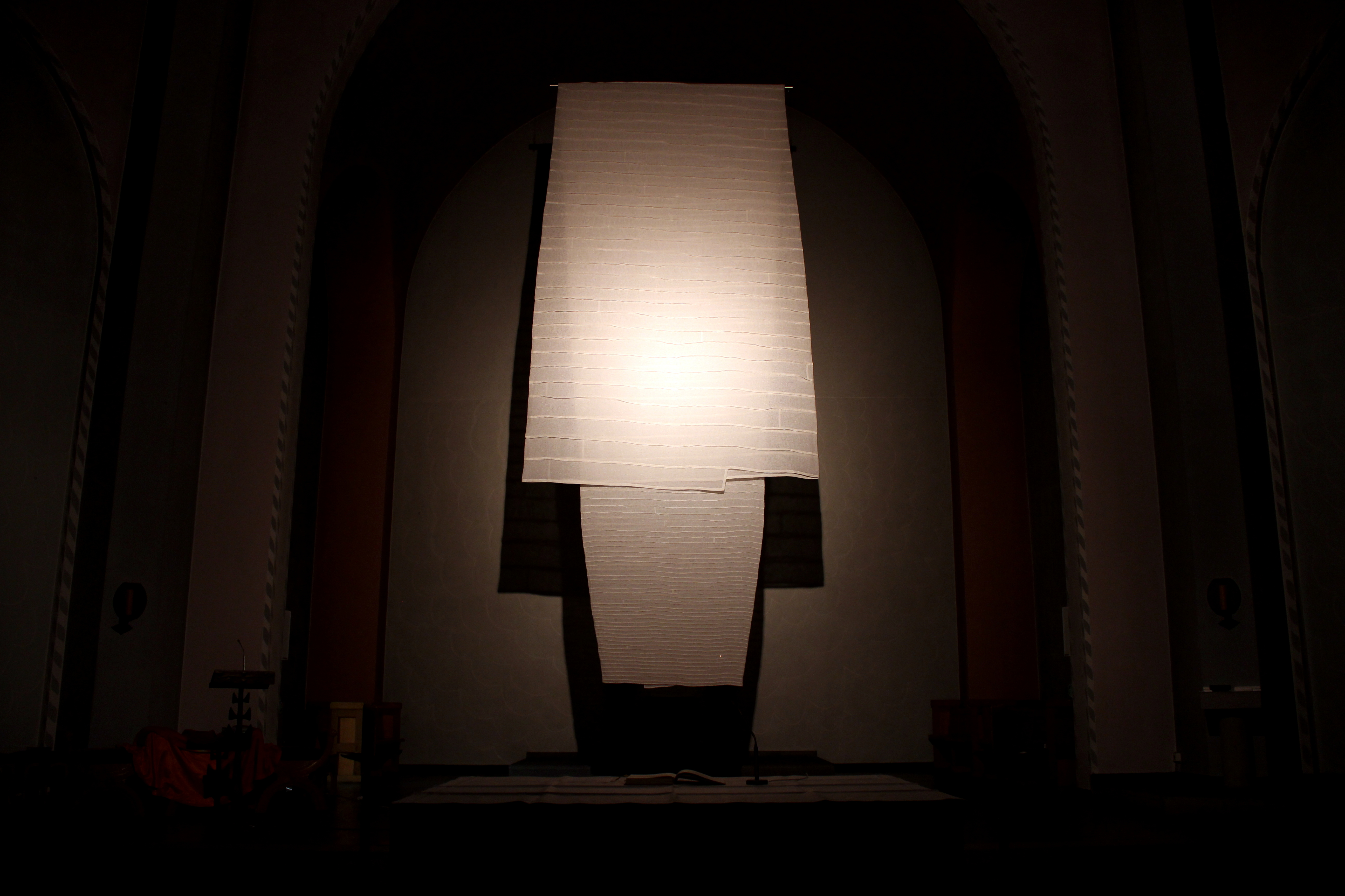 Das Fastentuch, das die Heilig Kreuz-Kirche durch den deutschlandweiten Gestaltungswettbewerb "Ars liturgica" erhalten hat. Die Aachener Künstlerin Claudia Merx schuf das Fastentuch.